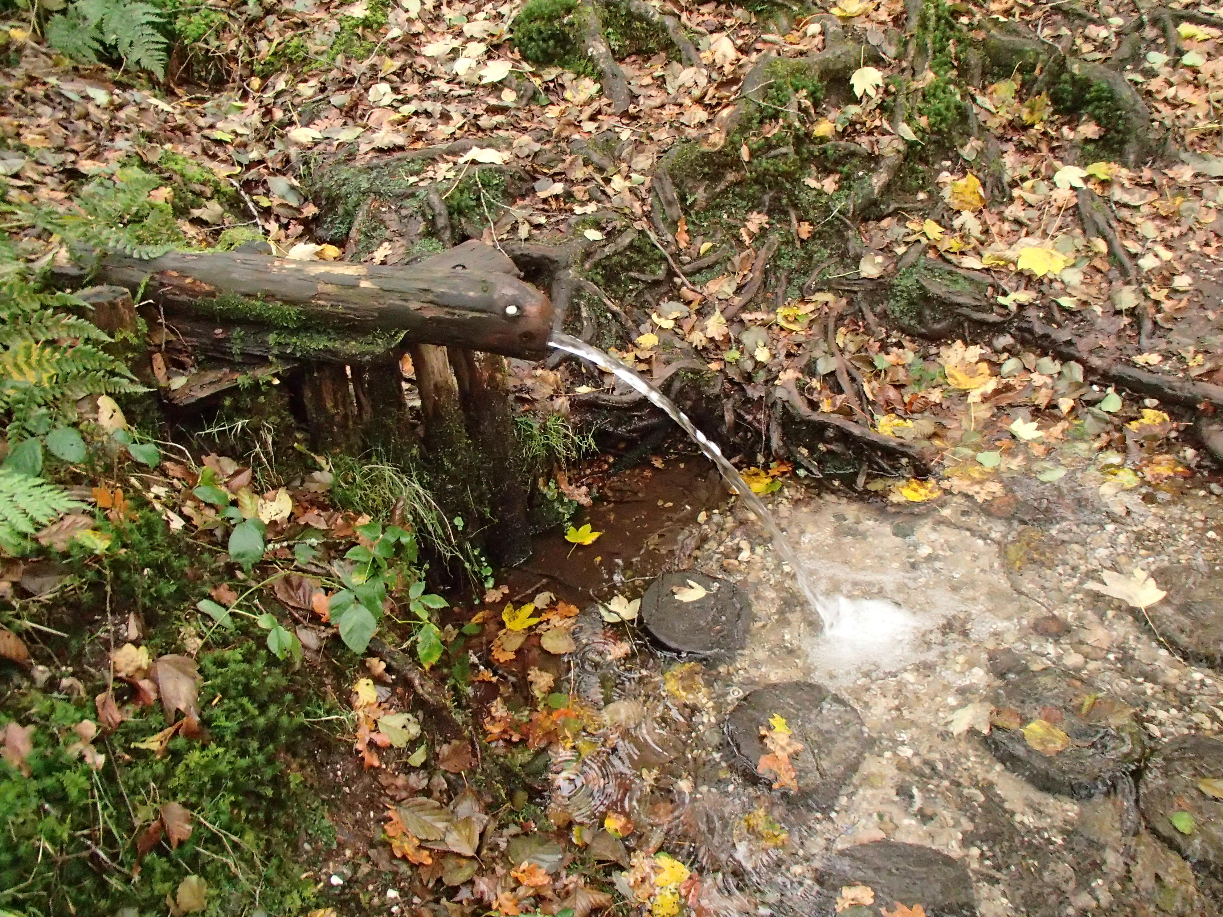 Jourmaine